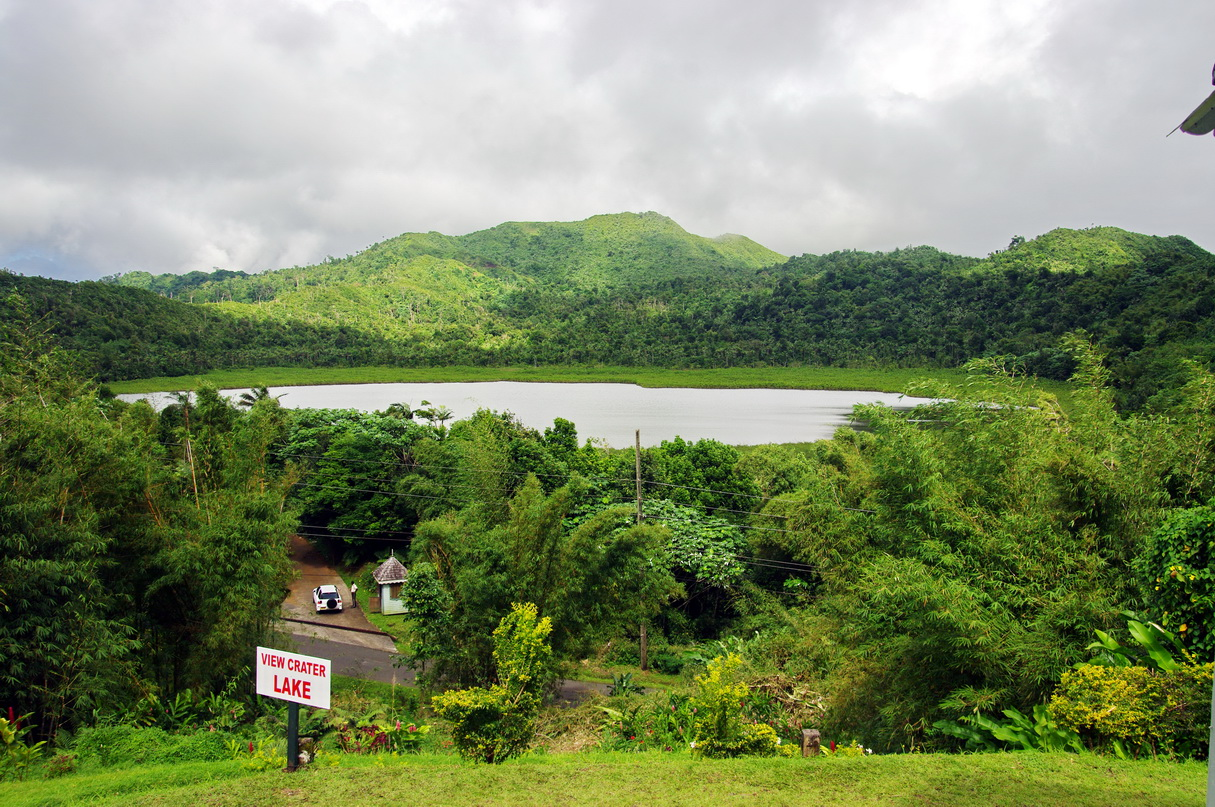 Grand Etang Kratersee auf Grenada